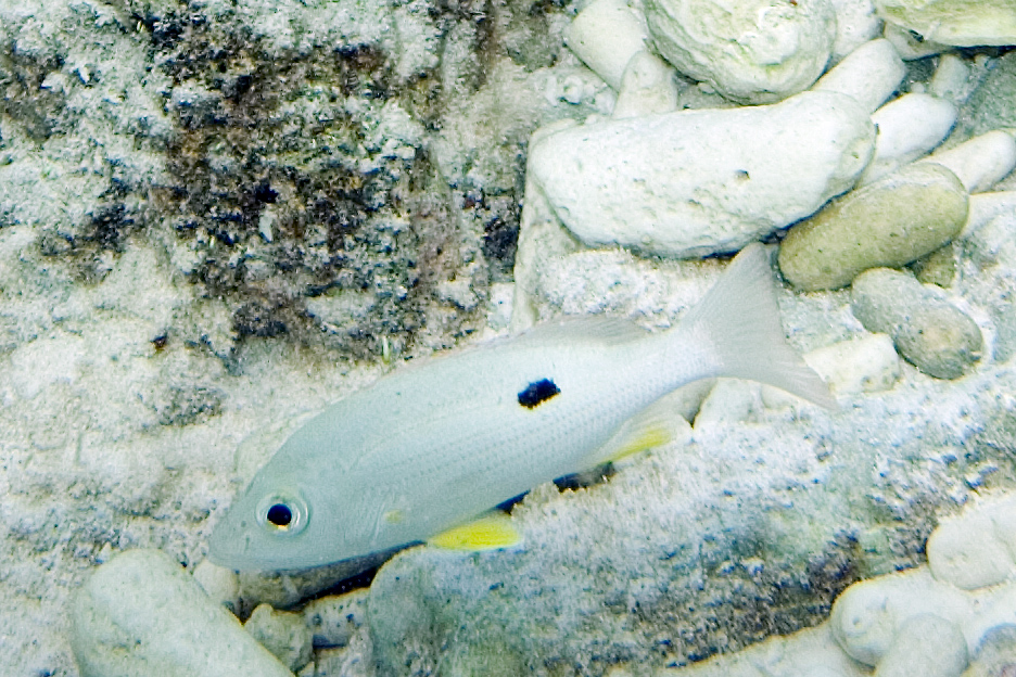 lane snapper Lutjanus synagris juvenile